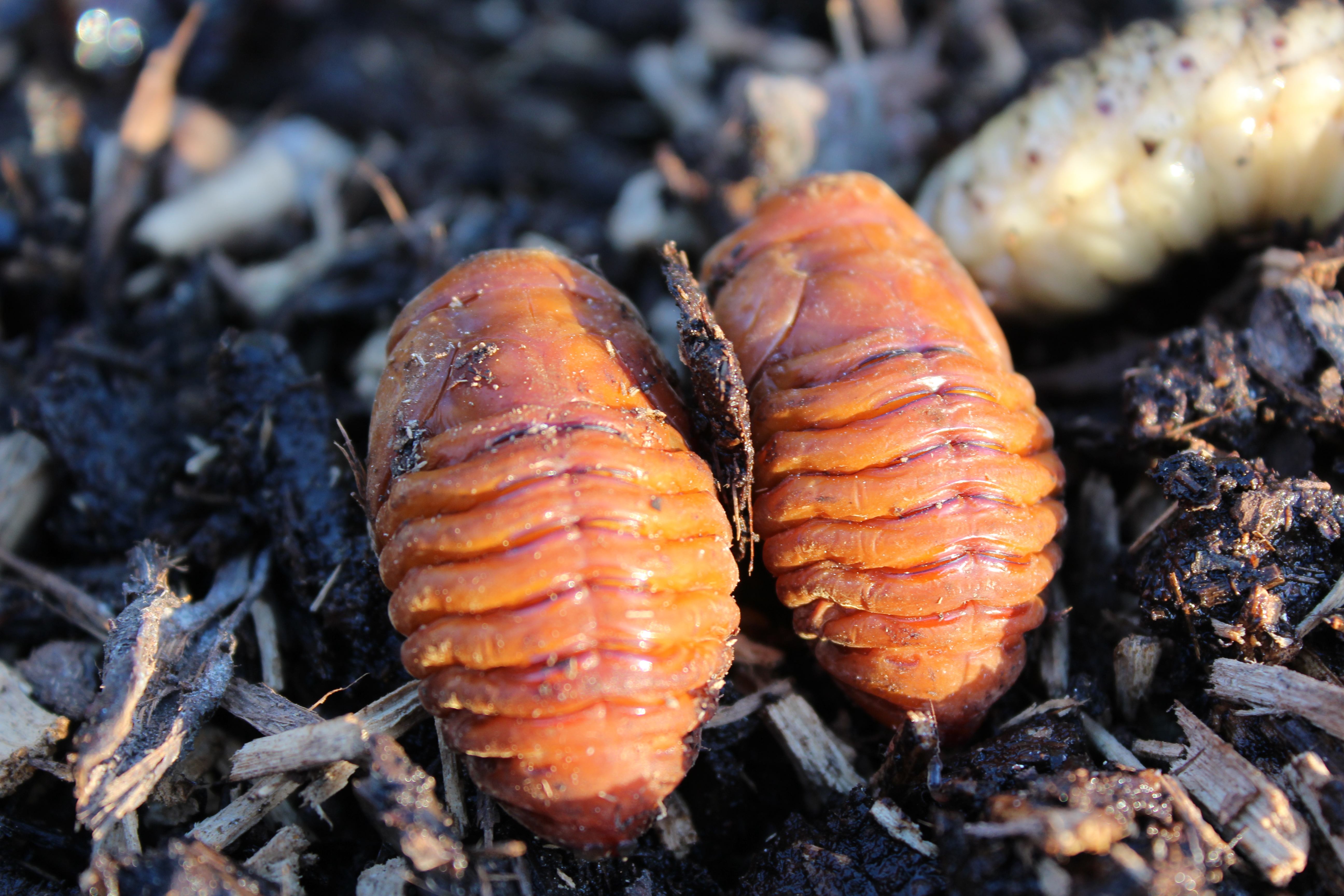 Eindstadiumlarve van een neushoornkever gevonden in een hakselhoop